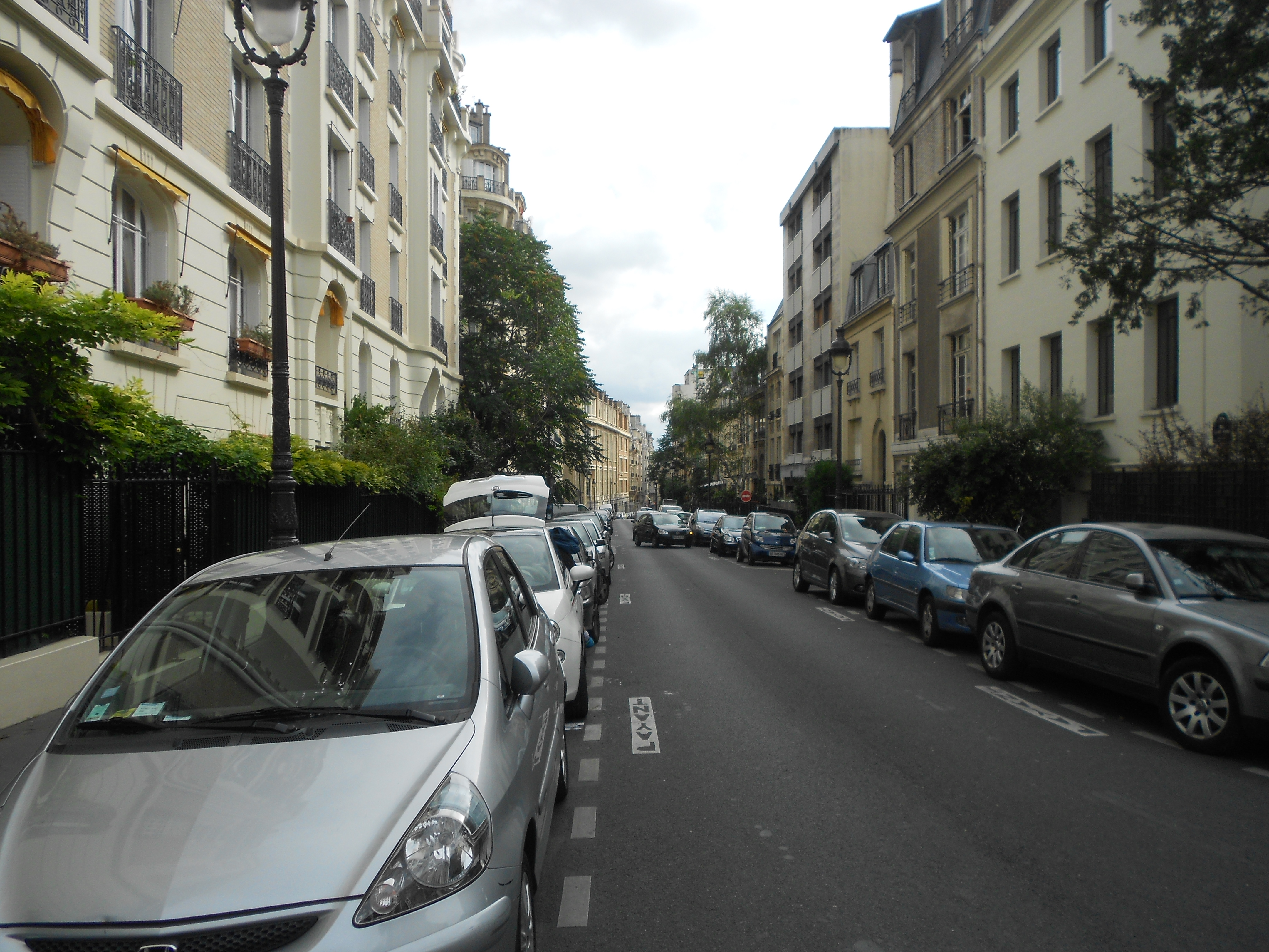 Vue de la rue depuis la rue du Docteur-Blanche.